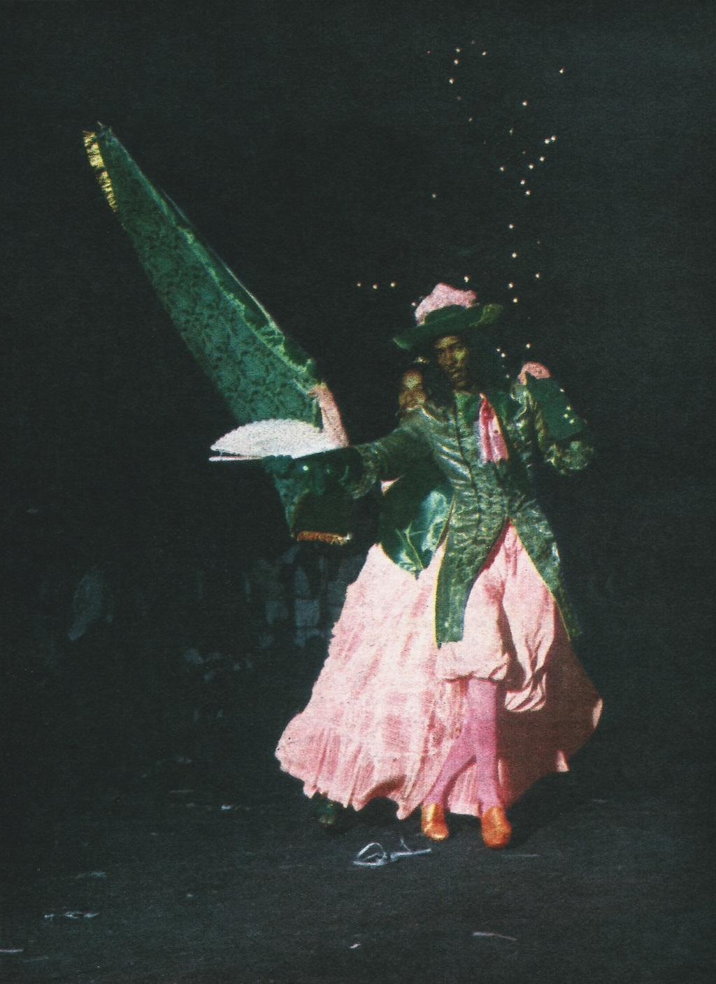 Estação Primeira de Mangueira, 1960